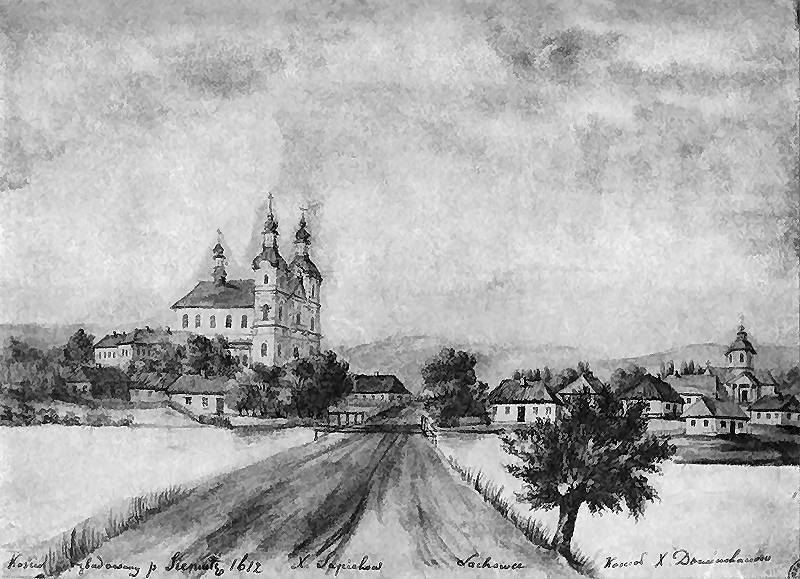 Ляхівці_Гравюра_ІІ_половини_ХІХ_ст.